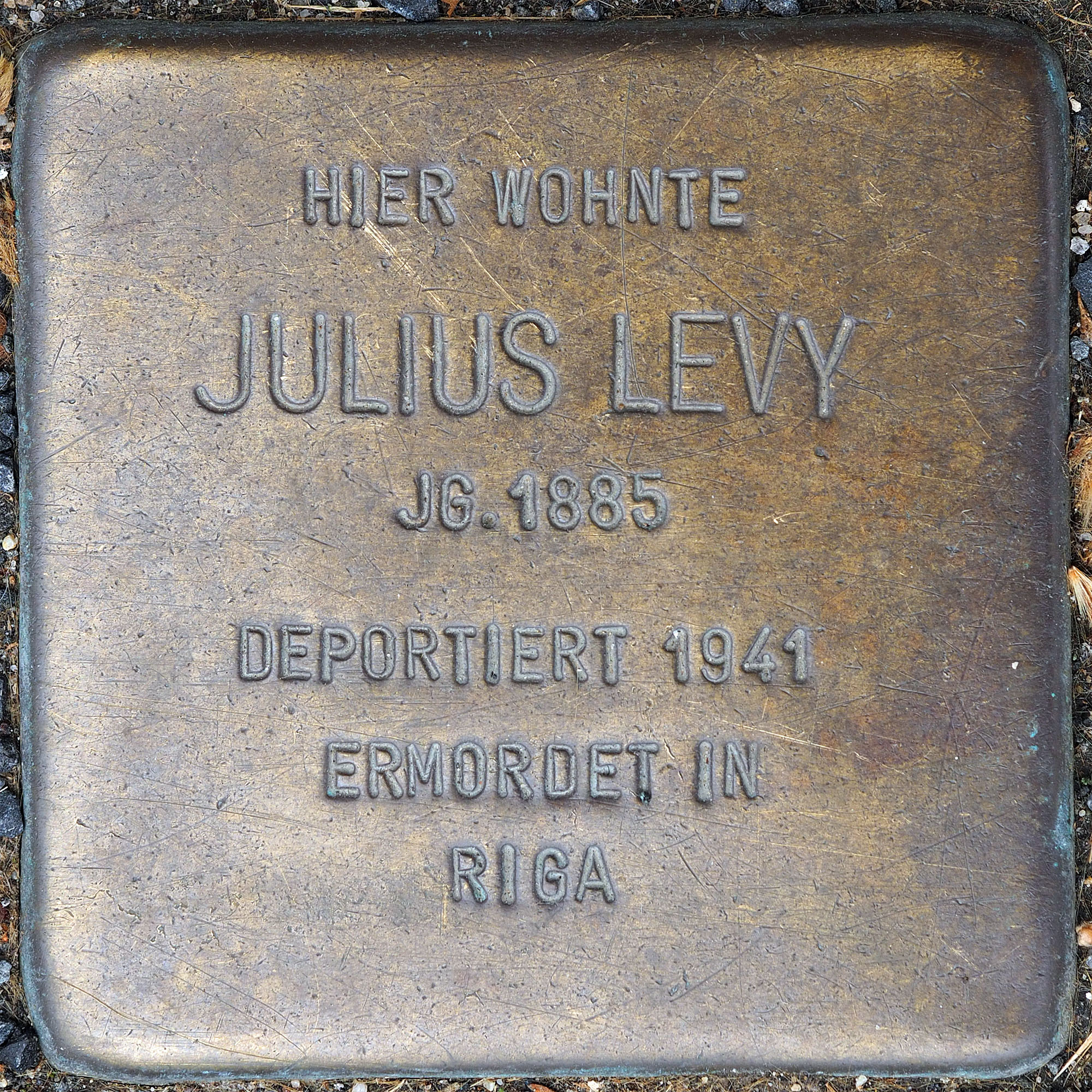 Stolpersteine MG: Levy, Julius